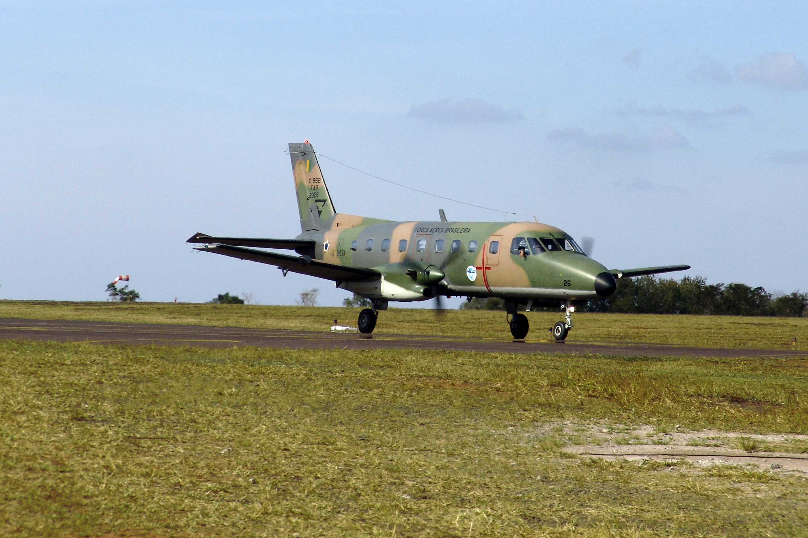 Embraer EMB-110 Bandeirante - (Exército Brasileiro) - Equipe de salto paraquedas. Aeroporto de Aeroporto de Avaré